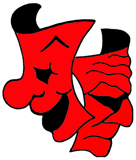 Logo des Karl-Theater Gießhübl (rot/schwarz)